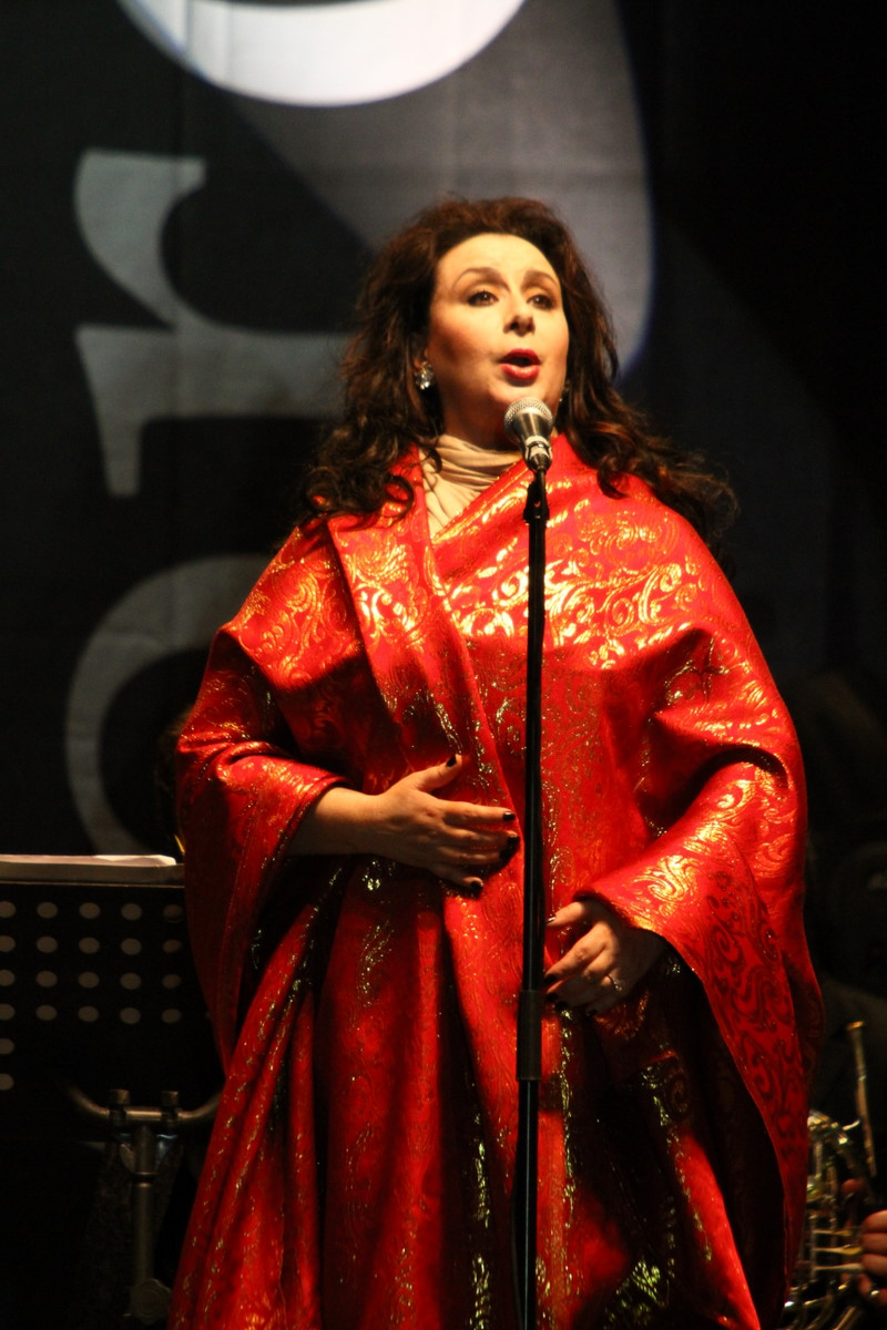 Verónica Villarroel en Antofagasta, 2011.